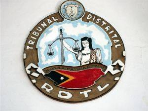 Logo der Distriktsgerichte Osttimor